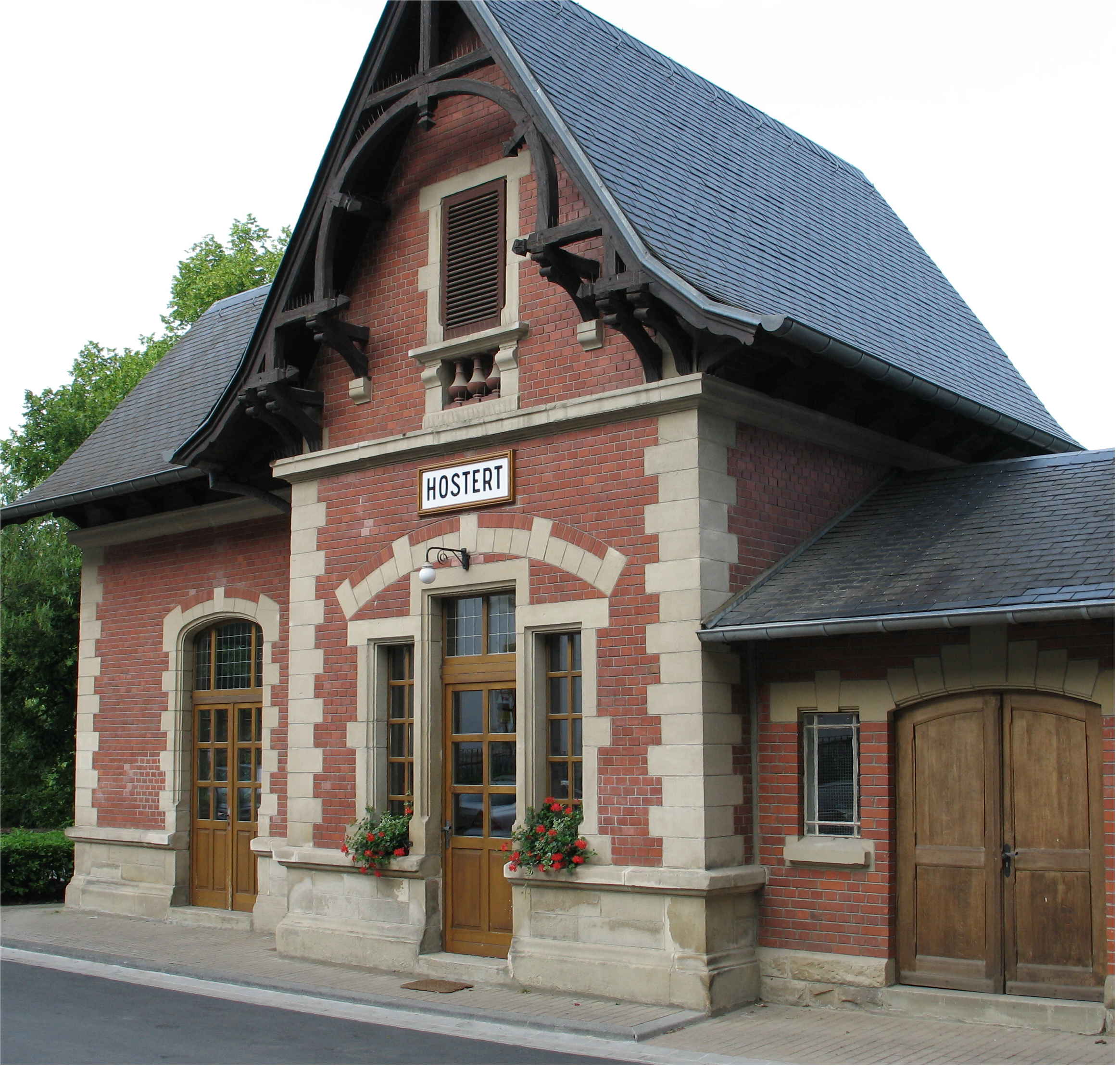 Al Charly's Gare zu Hueschtert.